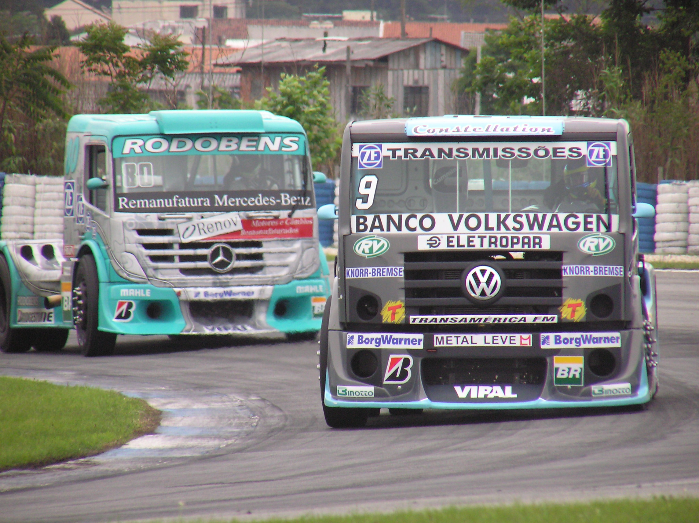 Fórmula Truck 2006 Rd.7 Curitiba: Volkswagen leads#9 Renato Martins (Volkswagen)#80 Vinicius Ramires (Mercedes-Benz)